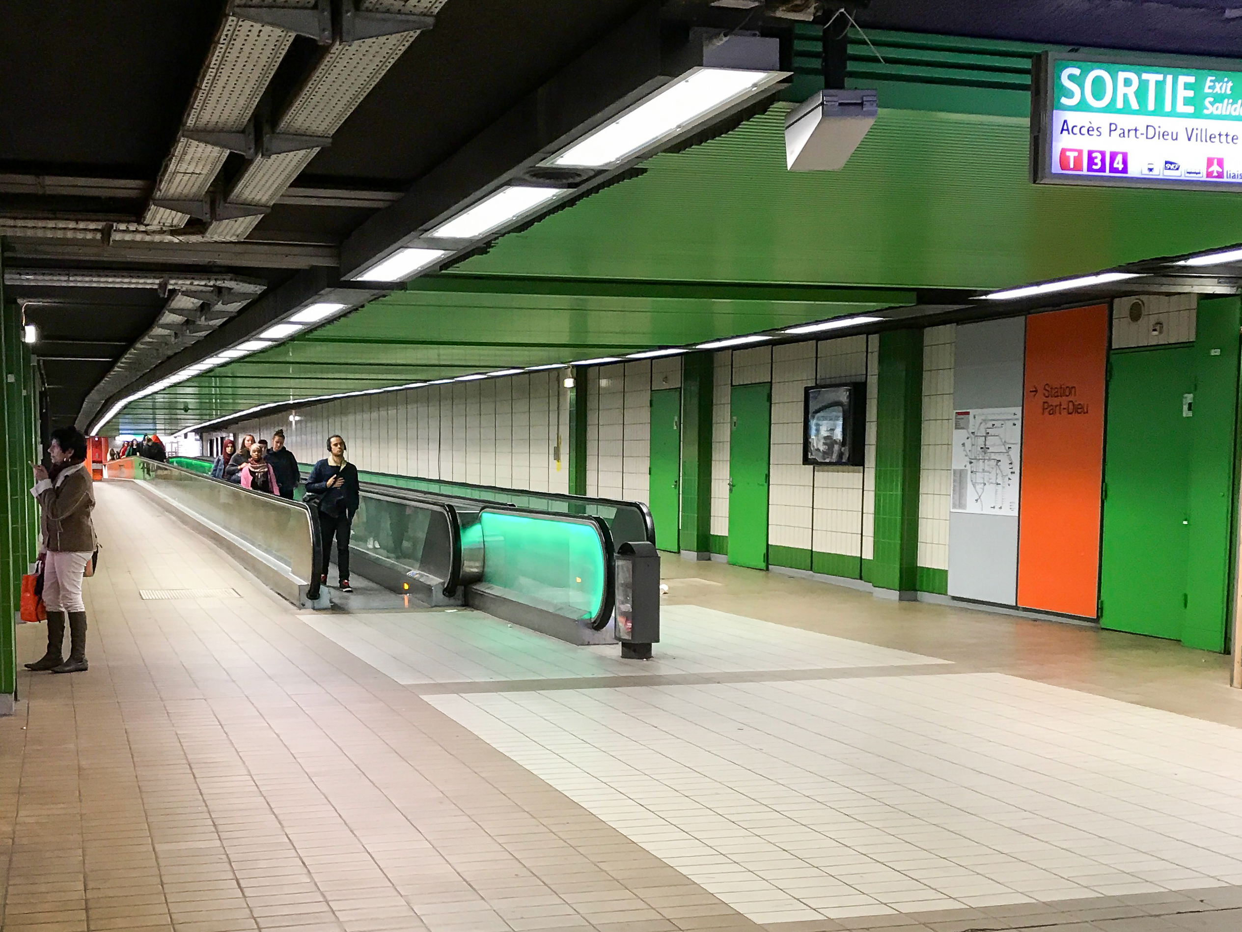 Couloir de correspondance / sortie vers la gare de Lyon-Part-Dieu en octobre 2017 (avant les travaux d'aménagement de la place basse Béraudier)